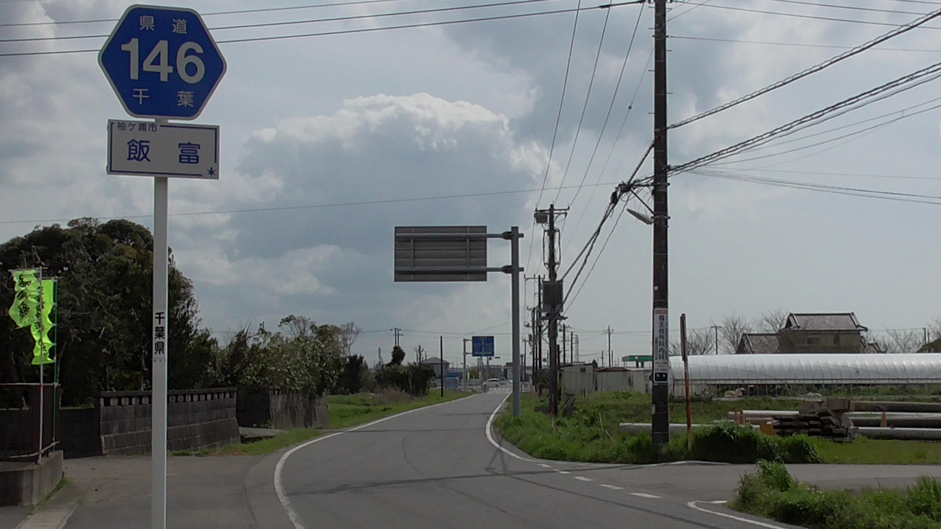 千葉県袖ヶ浦市内を通る千葉県道146号木更津根形線。写真は終点付近(袖ヶ浦市内)である。